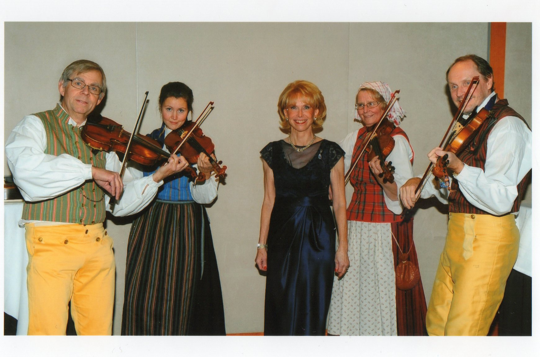 Sophie Ekman på sin 60 års dag